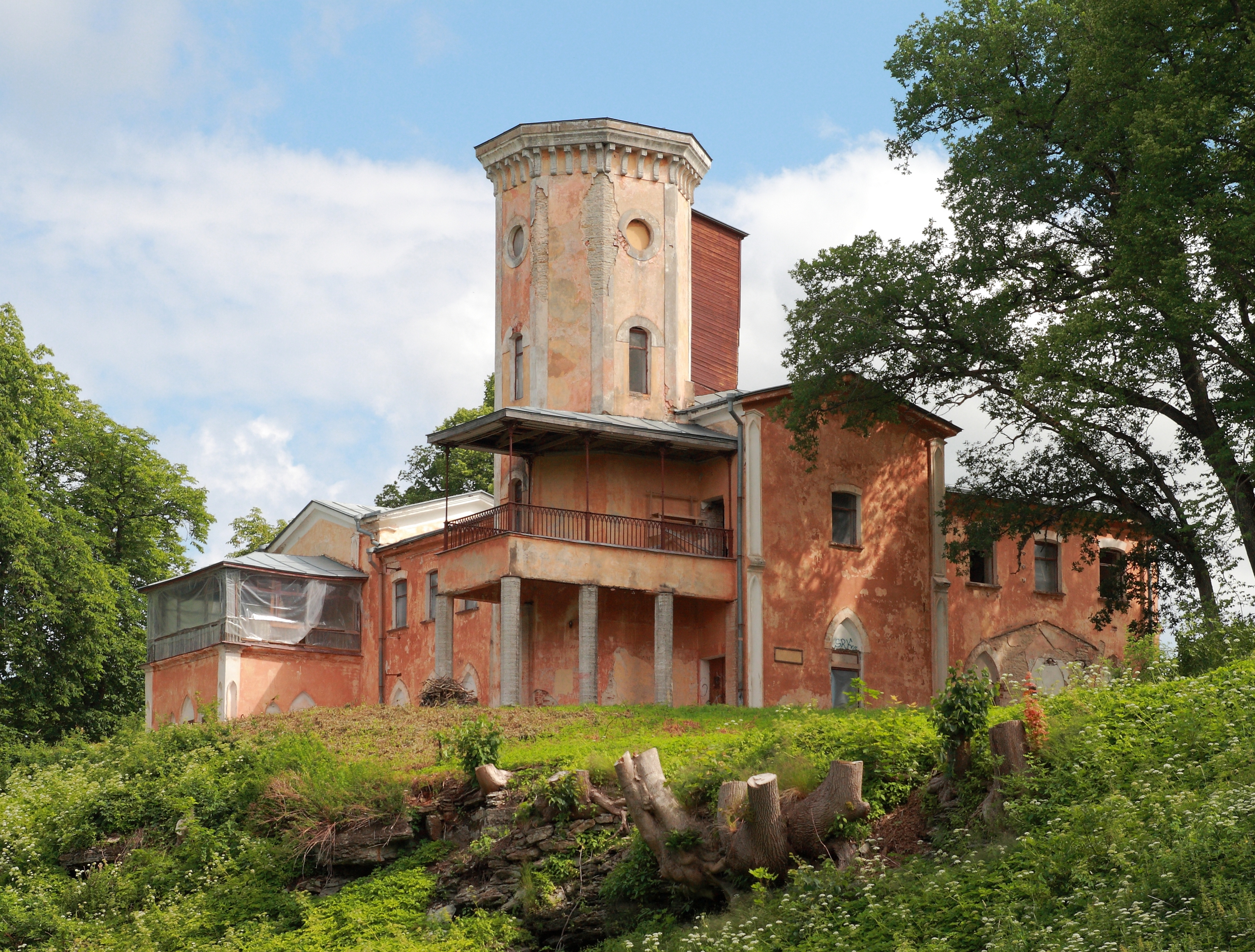 Keila-Joa mõisa peahoone, 1831-33